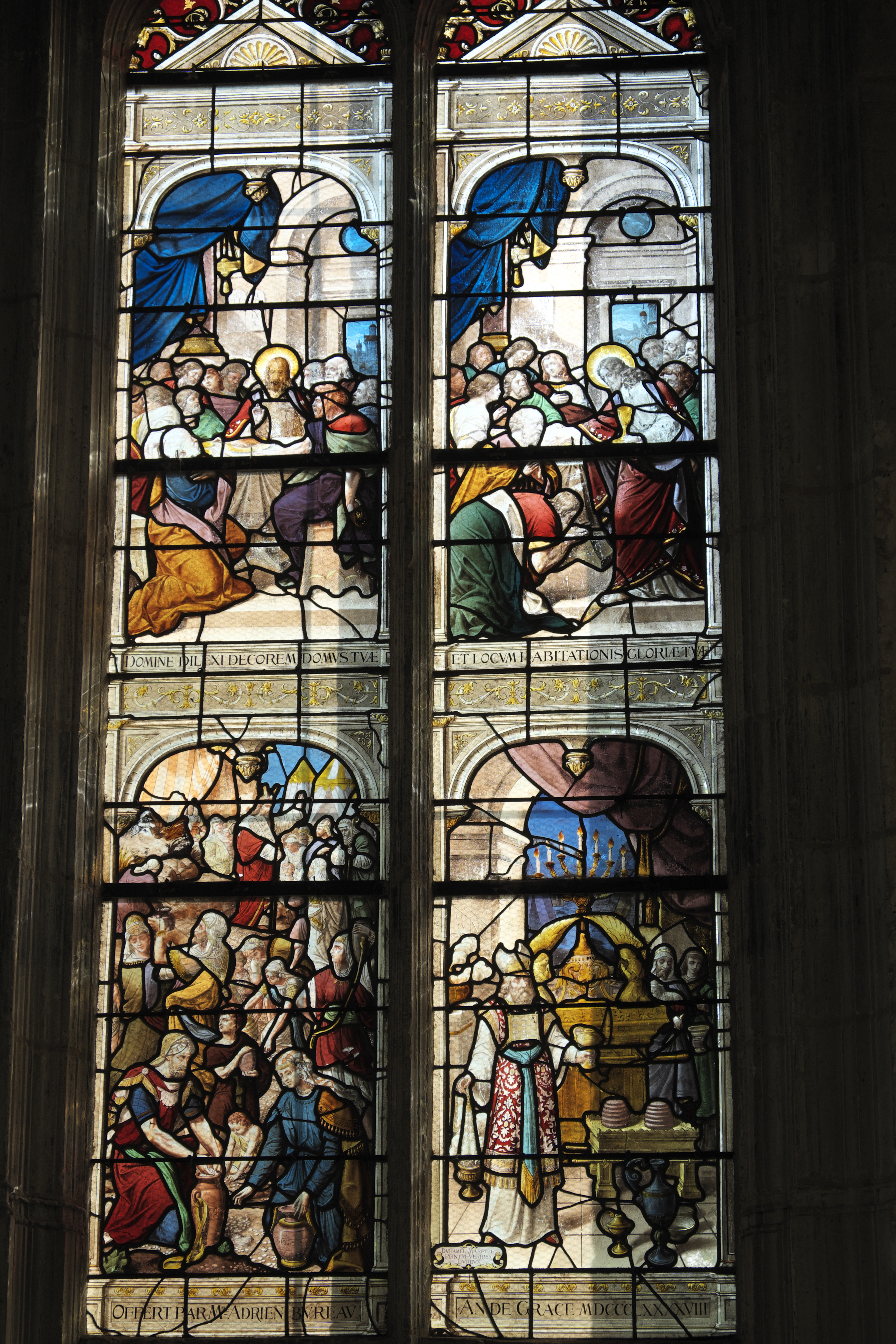 Katholische Kirche Saint-Hilaire in Tillières-sur-Avre im Département Eure (Region Normandie/Frankreich), Bleiglasfenster mit der Signatur: DUHAMEL-MARETTE PEINTRE-VERRIER EVREUX und der Jahreszahl 1898; Darstellung: Letztes Abendmahl (oben), Mannaregen (unten links), Opfer des Melchisedech (unten rechts)